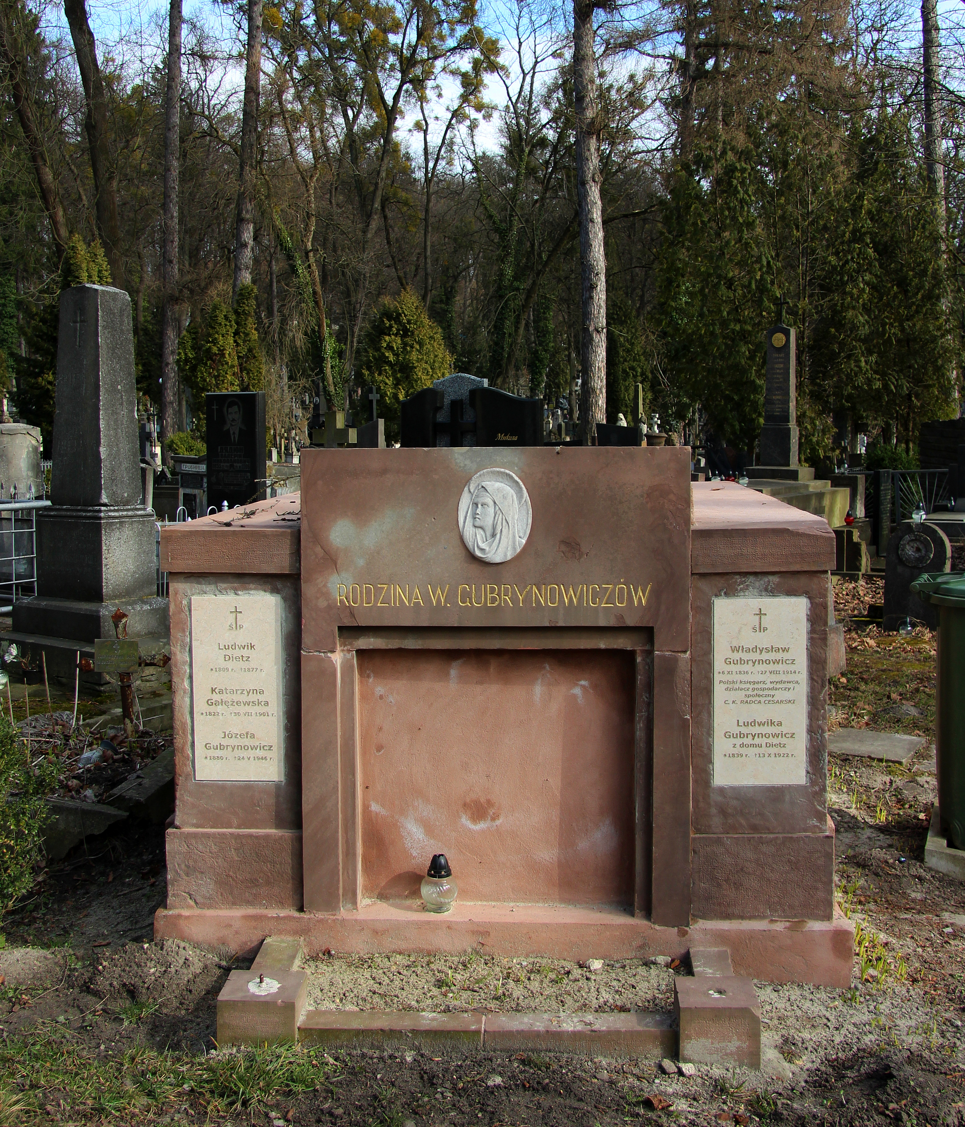 Родинний гробівець Губриновичів. Личаківський цвинтар , поле № 56.